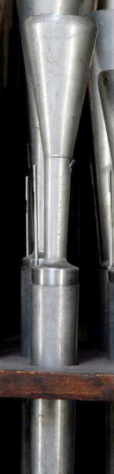 Photographie d'un tuyau de jeu d'orgue de hautbois de 8 pieds